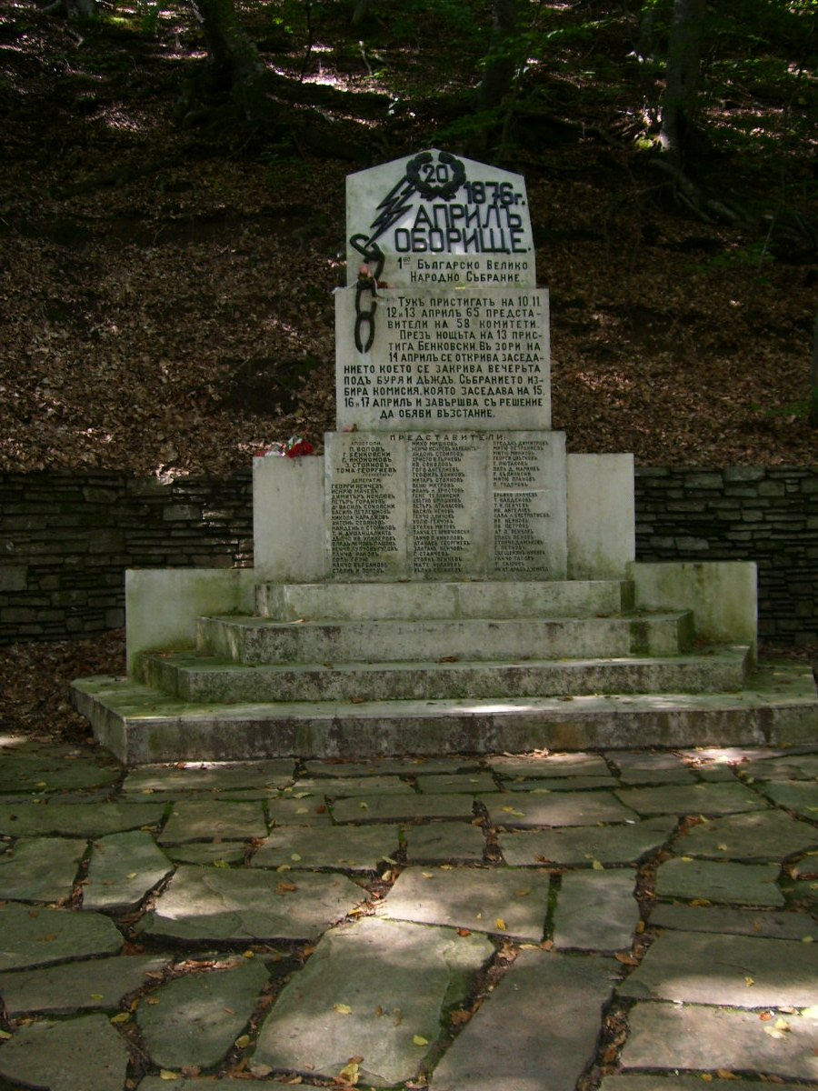 Паметник на Оборищенското събрание